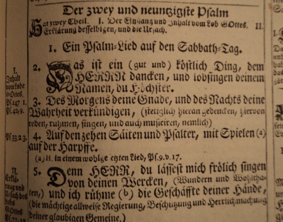 Beginn des Psalms 92 in einer Ausgabe der Kurfürstenbibel von 1768